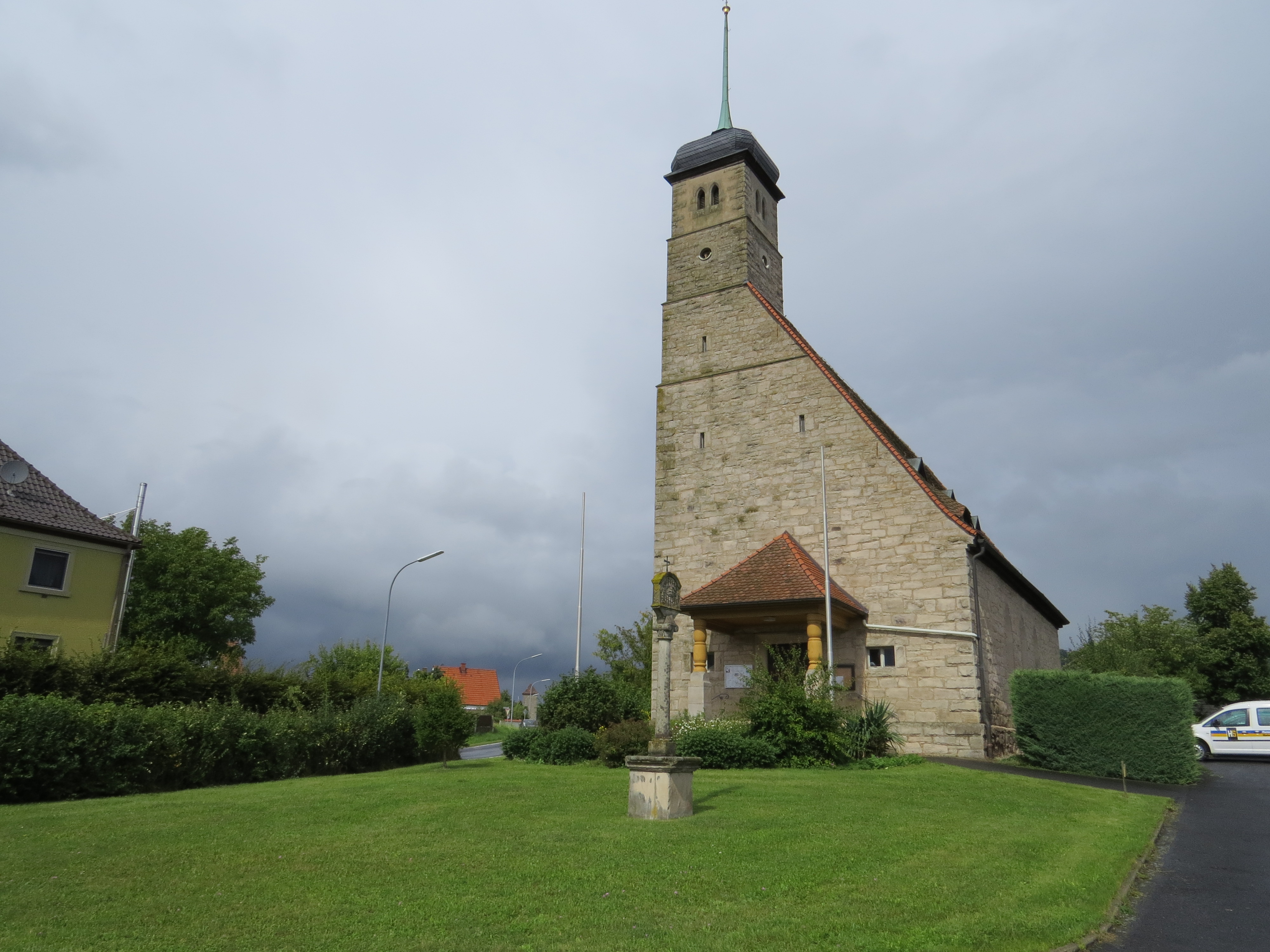 Kirche in Hundelshausen, Michelau im Steigerwald